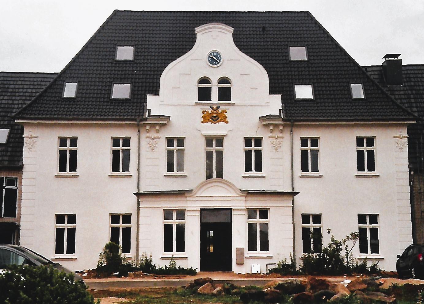 Einstiges Wohnhaus des kgl. bayr. Generalkonsuls in Lübeck